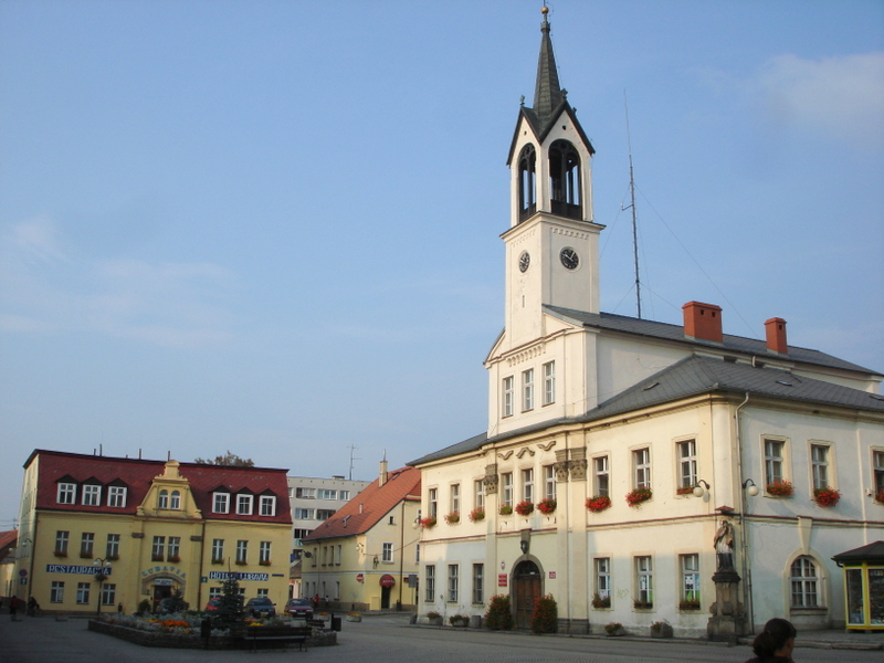 Ratusz w Lubawce